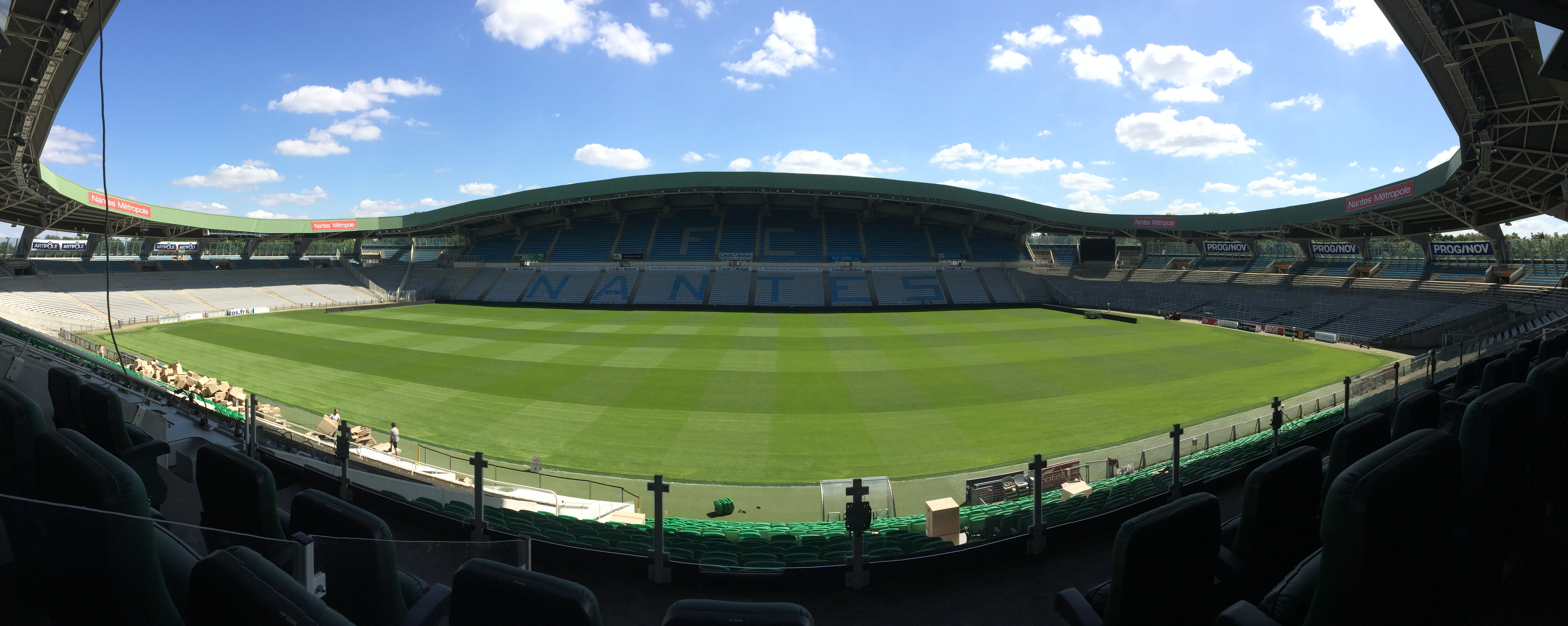 Stade la Beaujoire vue depuis la tribune présidentielle